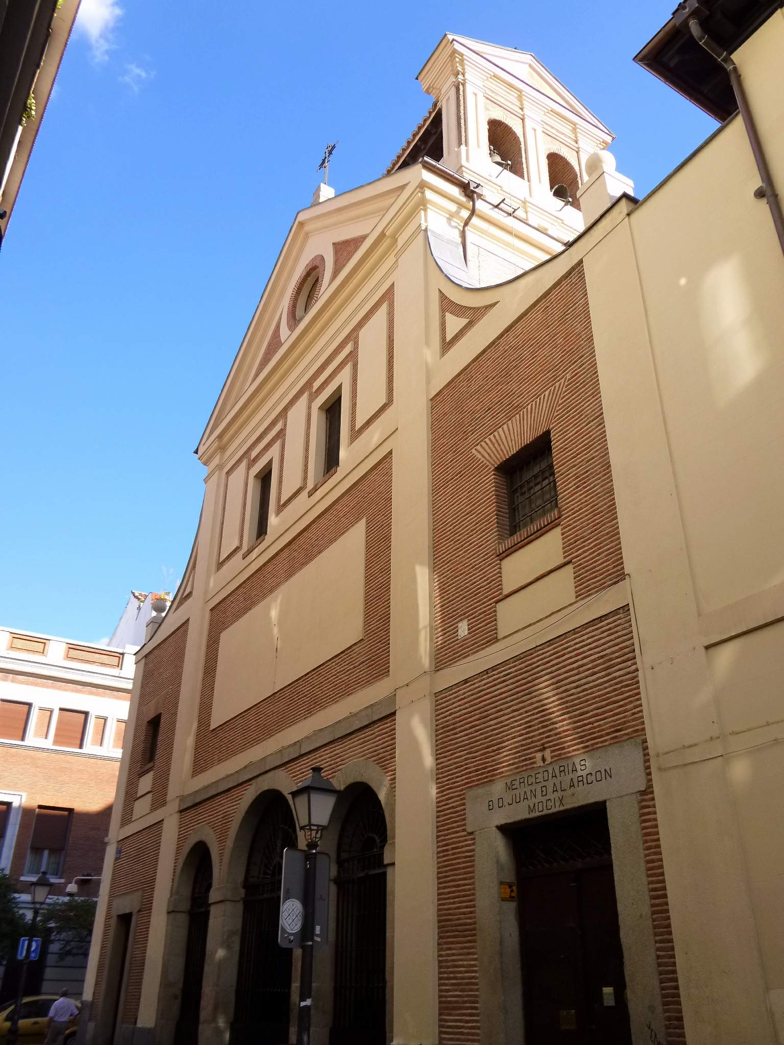 Convento de Don Juan de Alarcón (MM Mercedarias), en Madrid